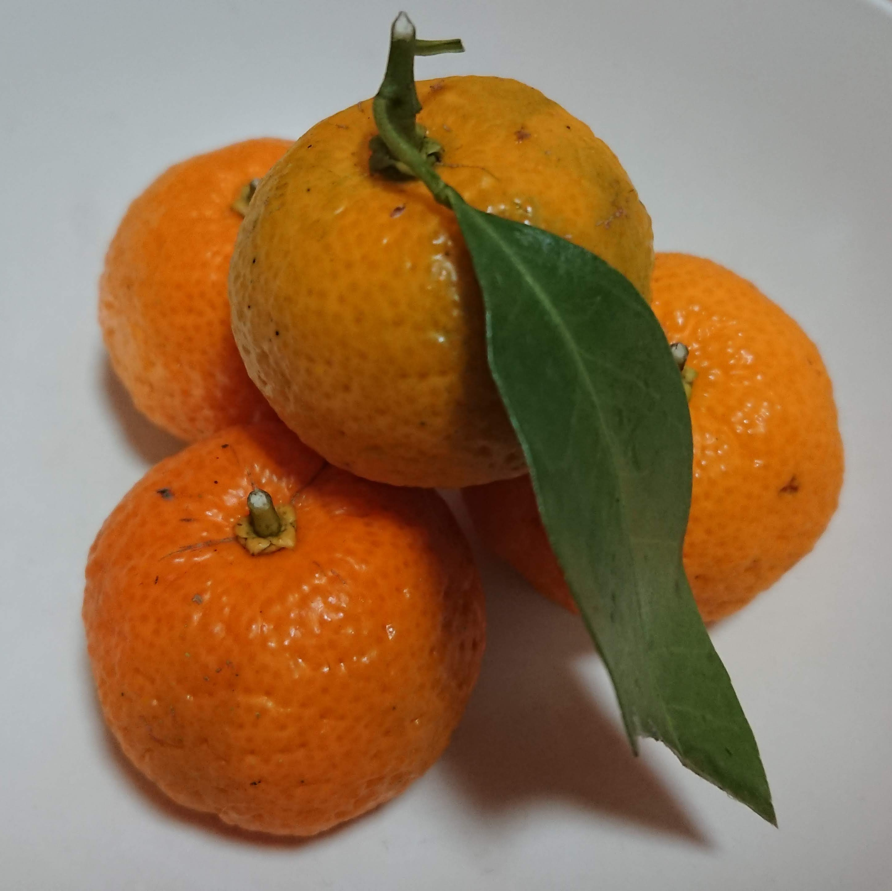 新姫（にいひめ）、タチバナとマンダリンの交雑実生と推定される三重県熊野市で見つかった新種の柑橘類。